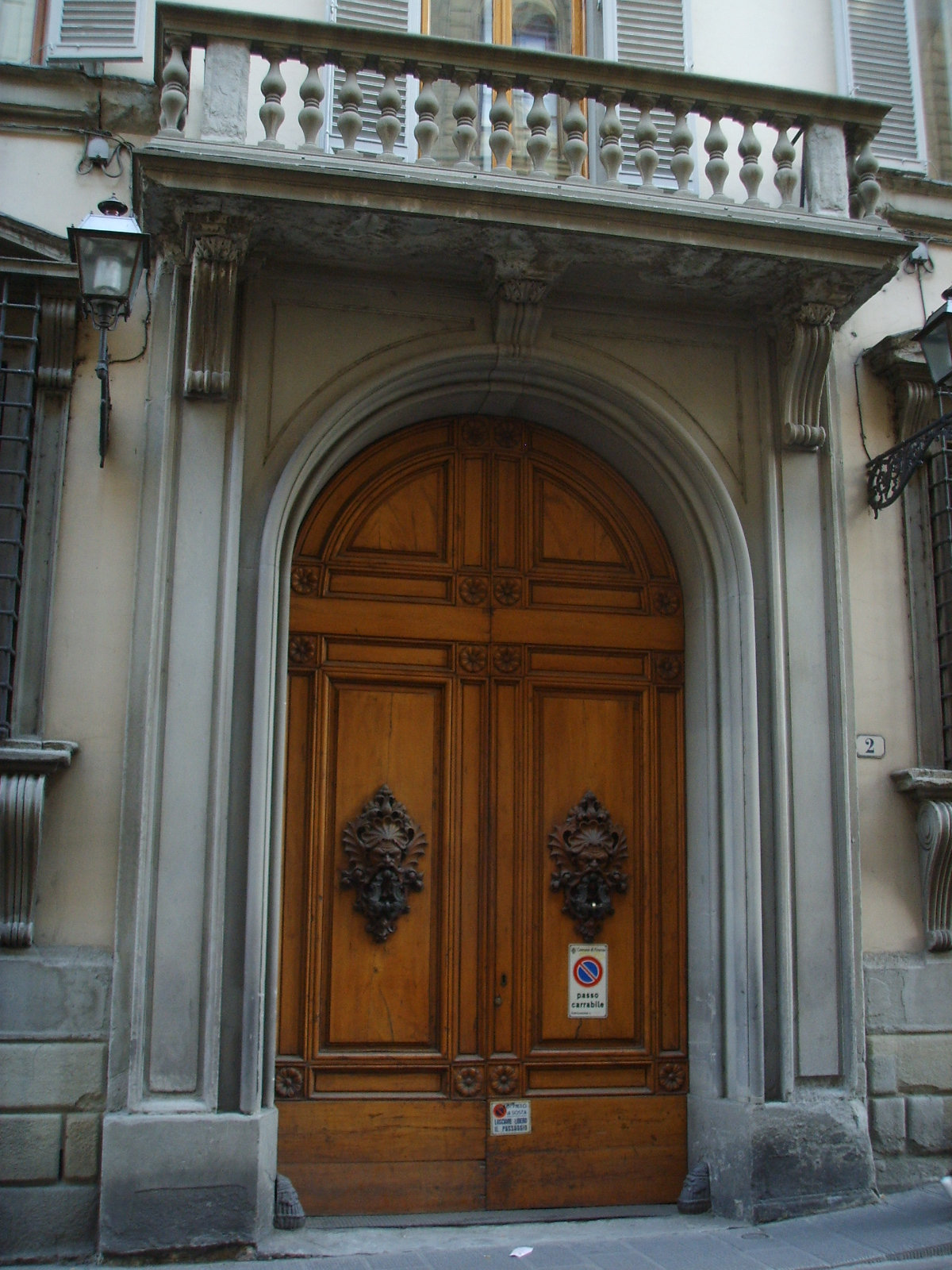 Palazzo Bardi-Tempi, portale 2